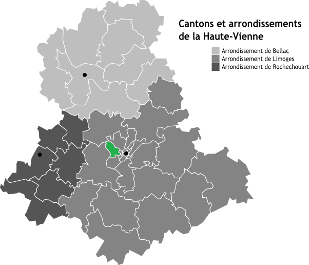 Canton de Limoges-Landouge, Limousin, France en Carte des arrondissements de la Haute-Vienne